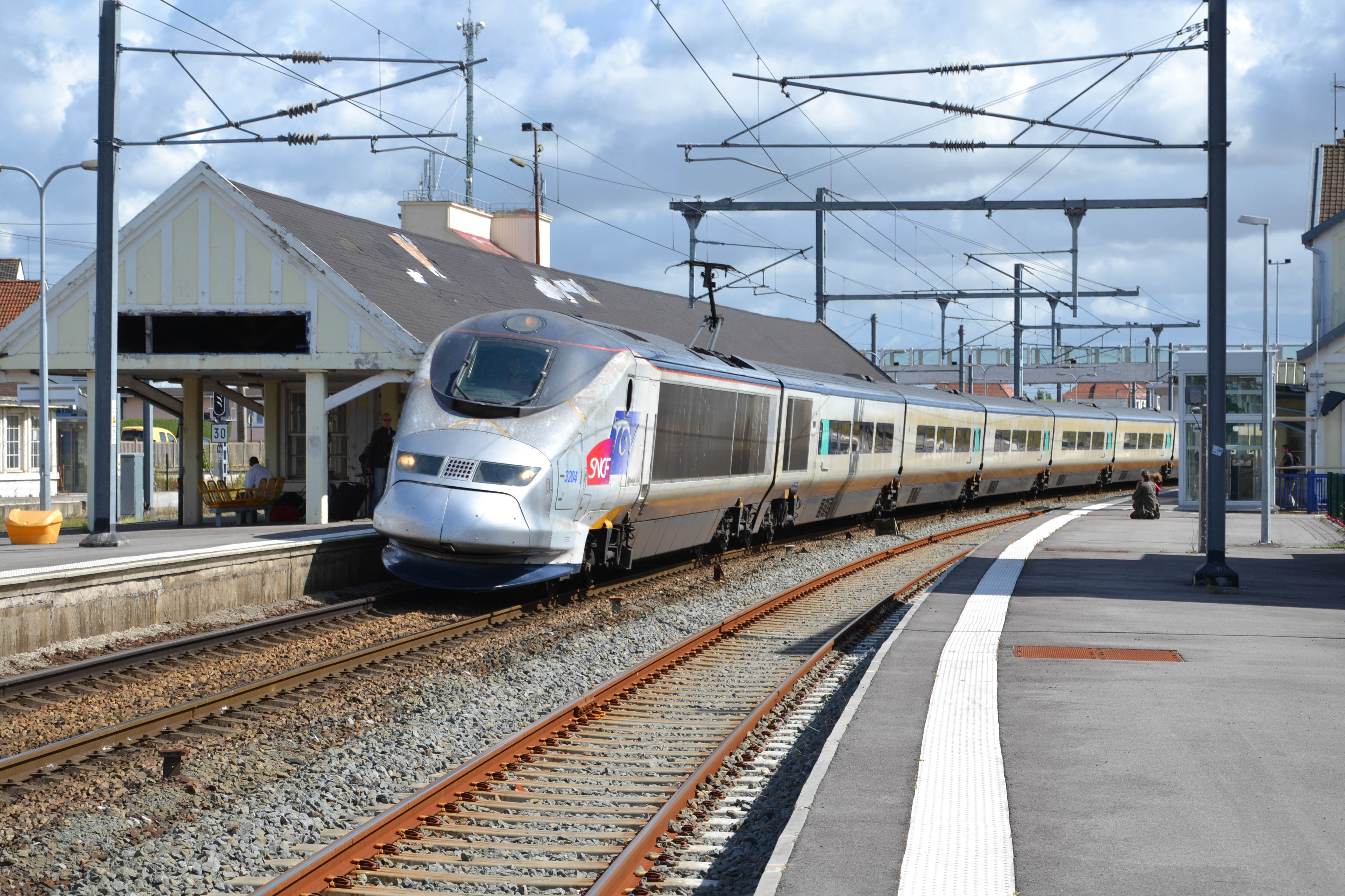 In Noord-Frankrijk kan je met regionale kaartjes met de TGV mee, als je een toeslag hebt. Dit slaat aan, en het is dan ook niet verbazend dat het aardig druk kan zijn aan boord van de betreffende TGV's. In Étaples stapte ik op TERGV 67573, ook bekend als TGV 7573, naar Lille Europe, en Paris-Nord. De trein werd gereden met een Eurostar-treinstel, een stel met 18 rijtuigen. Het was nodig. En Nord-Pas-de-Calais, les titres régionaux sonts acceptés à bord des TGV sur certaines axes. Un veritable succes, à cause des fortes reductions des temps de parcours. C'est donc pourquoi le TERGV 67573/TGV 7573 à destination de Lille Europe et Paris-Nord est exploité avec une rame Eurostar de 18 voitures: il y a beaucoup du monde.